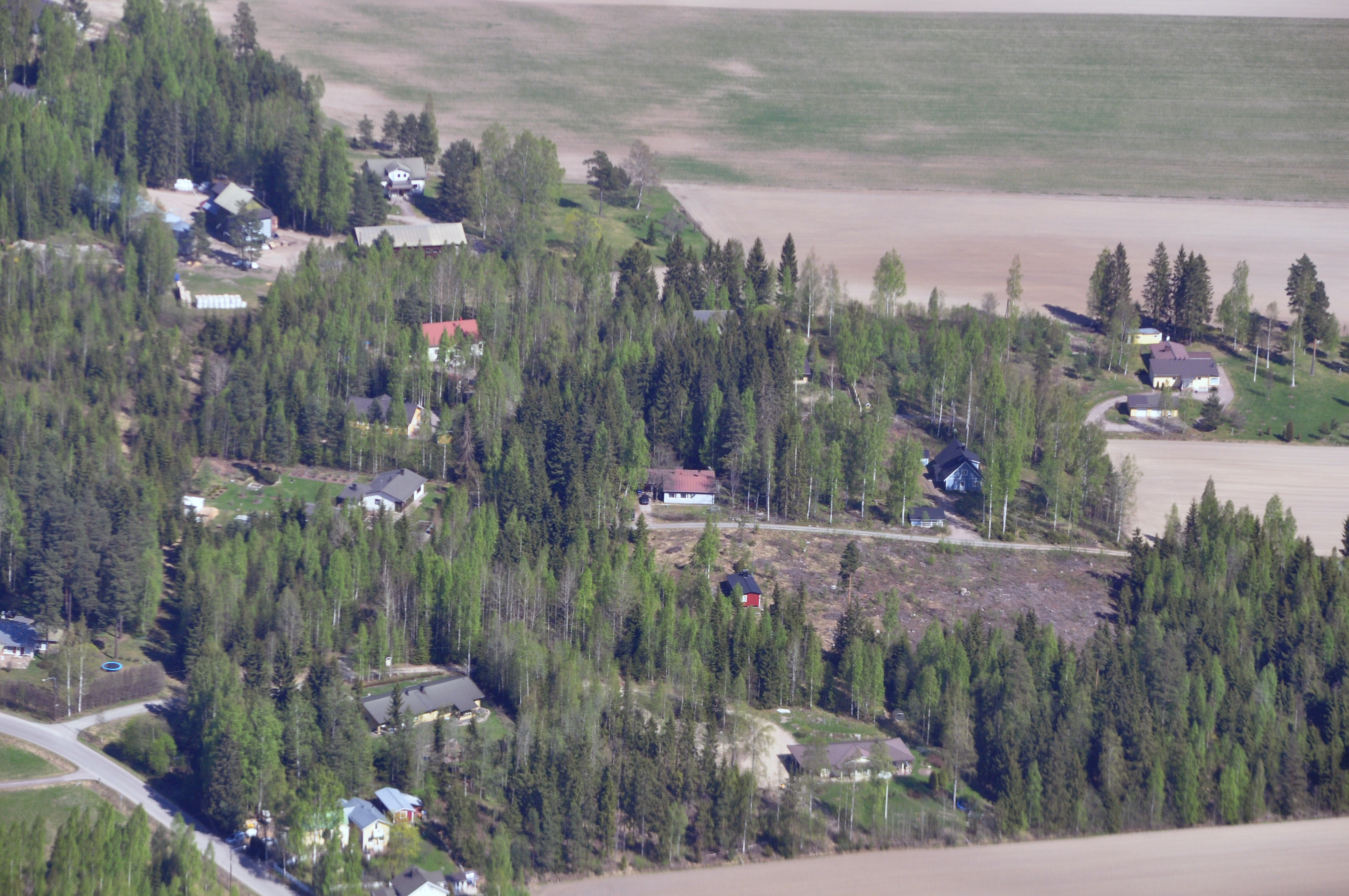 Palojoki village in Nurmijärvi, Finland